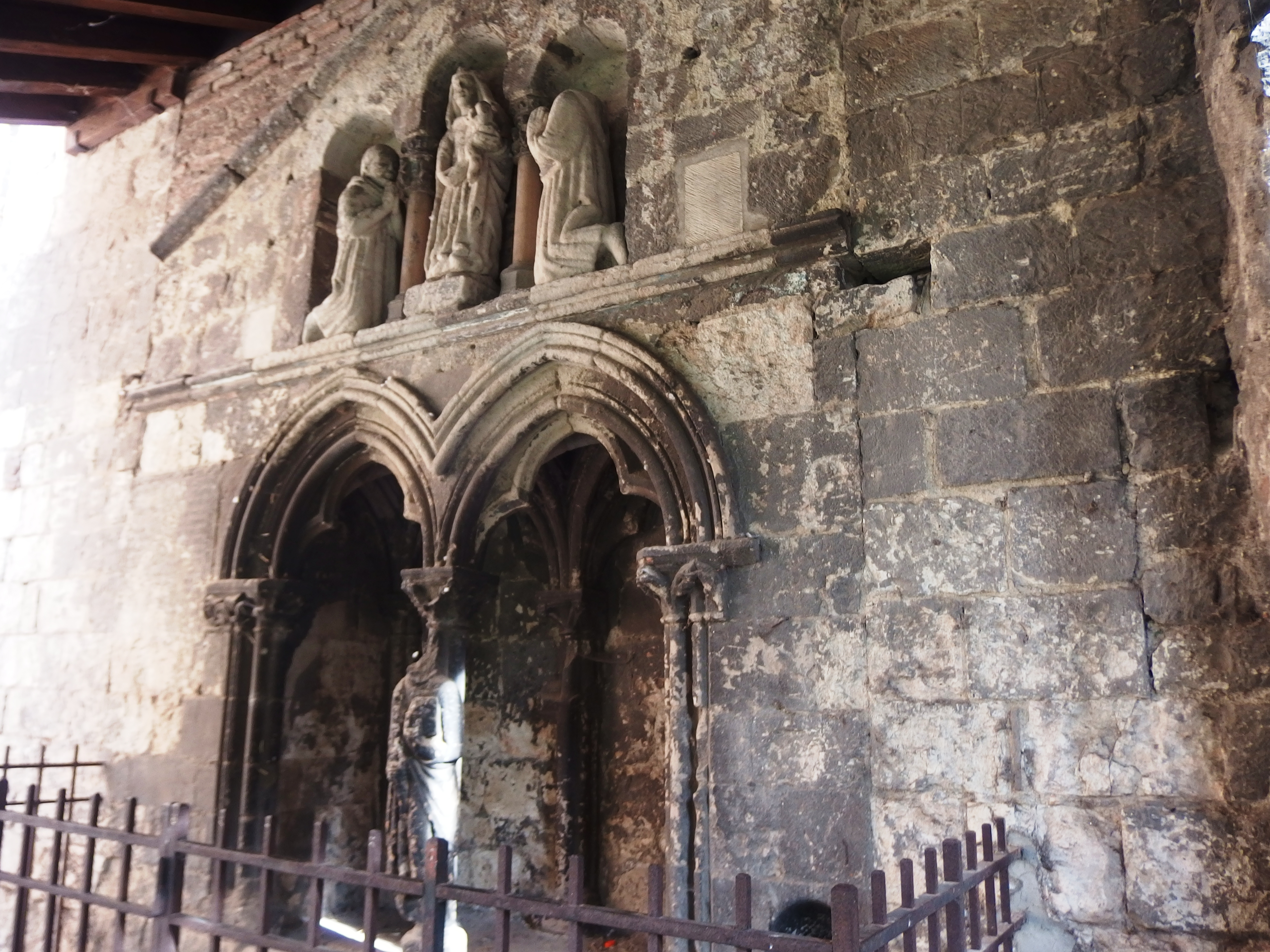 Tombeau de Vital de Malvezi, maçon qui a travaillé à faible coût en échange du privilège de se faire ensevelir dans le cloitre.